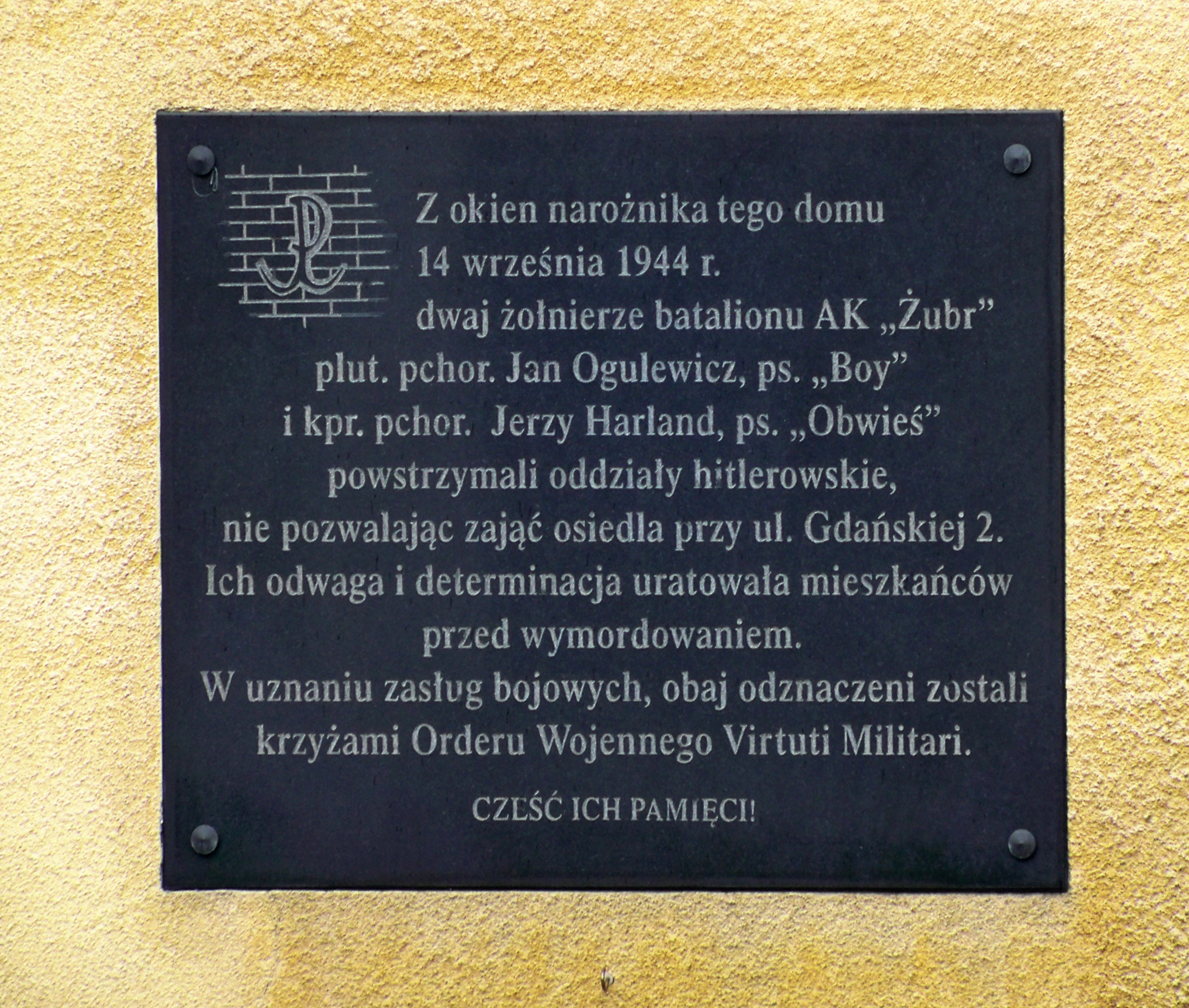 Tablica pamiątkowa na zespole domów przy ul. Gdańskiej 2 w Warszawie – kamienicy Spółdzielni Stowarzyszenia Urzędników Państwowych.